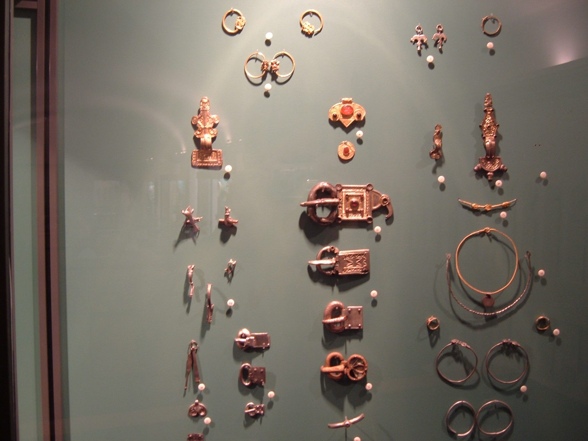 Gepida tárgyak (Damjanich János Múzeum, Szolnok)